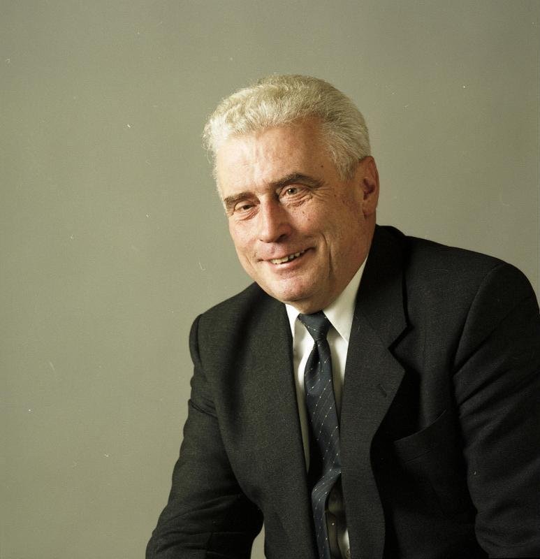 3.12.1985 Prof. Dr. Franz Klein - Präsident des Bundesfinanzhofes München.